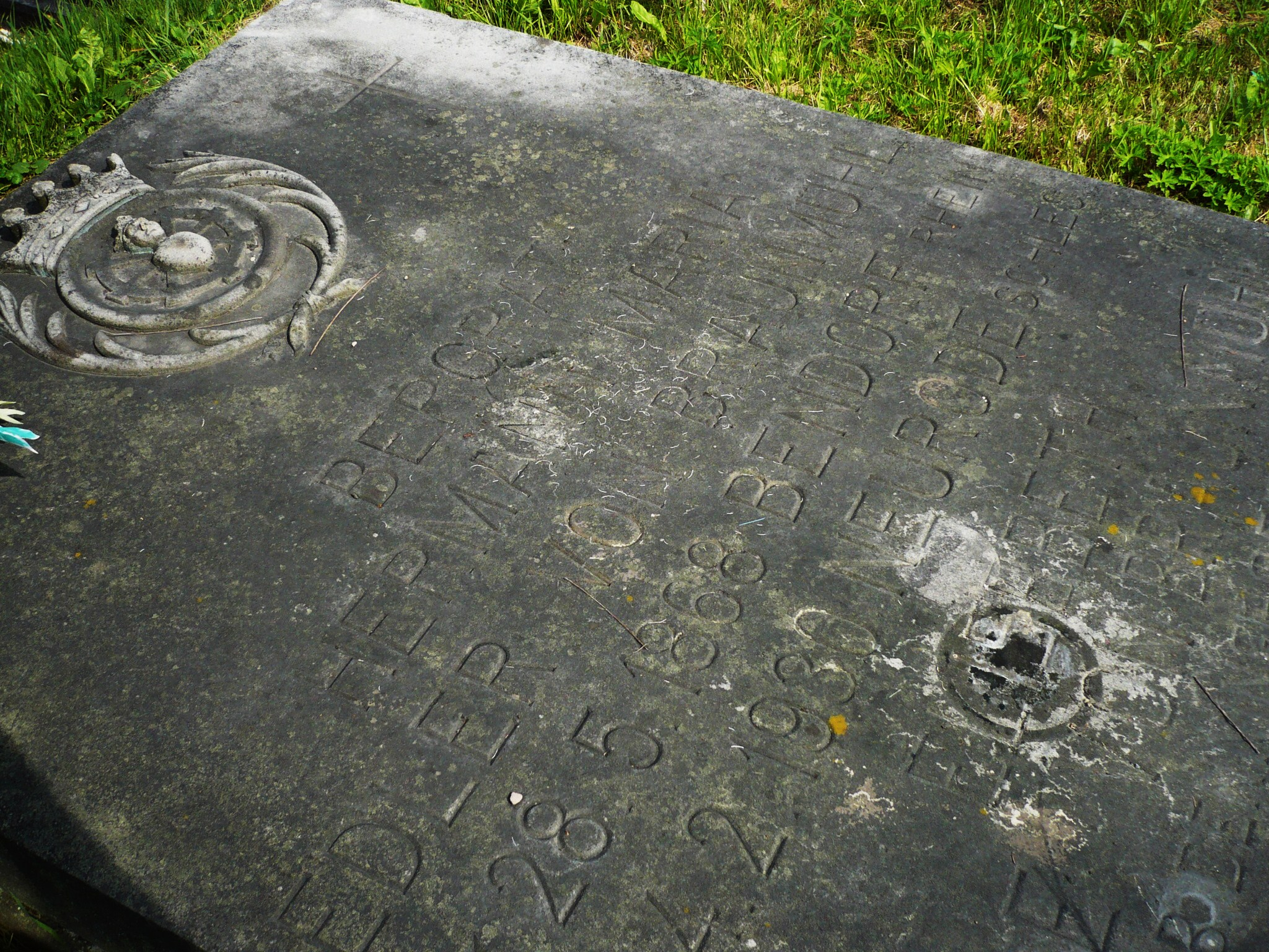 Nowa Ruda, ul. Cmentarna - cmentarz komunalny (płyta nagrobna)